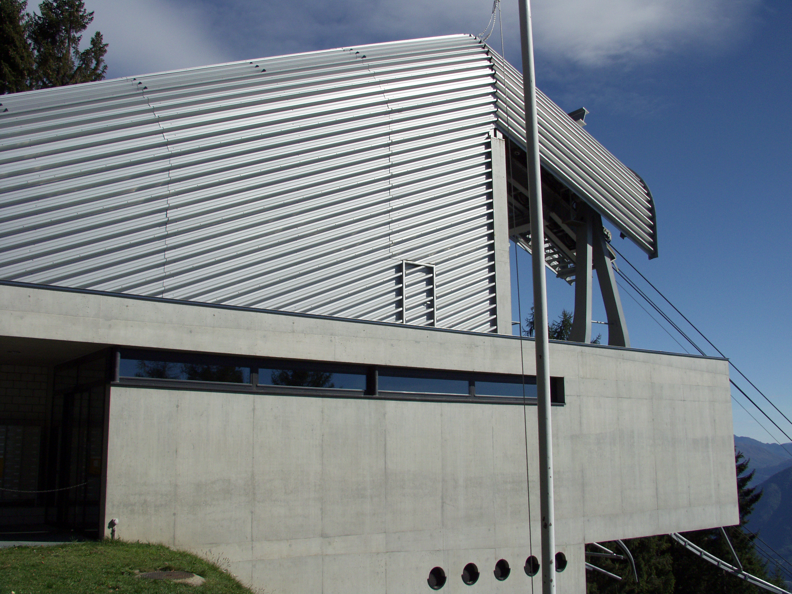 Bergstation der Luftseilbahn Orselina-Cardada von Mario Botta